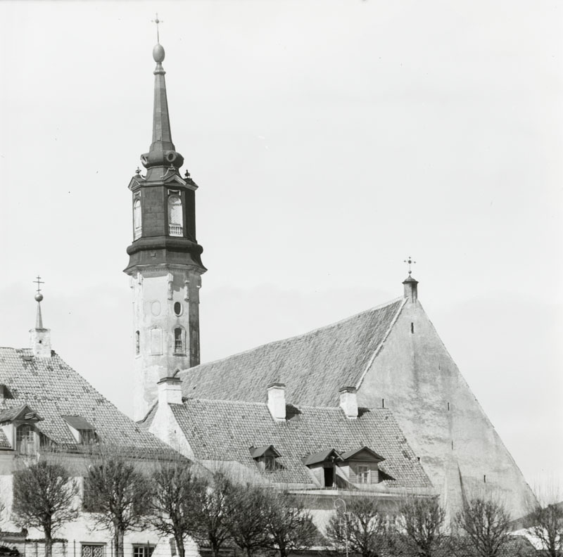 Narva Jaani kirik